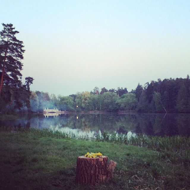 Долина рек Хрипань и Куниловка: Кратово,Раменский район, Московская область This image is related to the protected area of Russia number 5010227